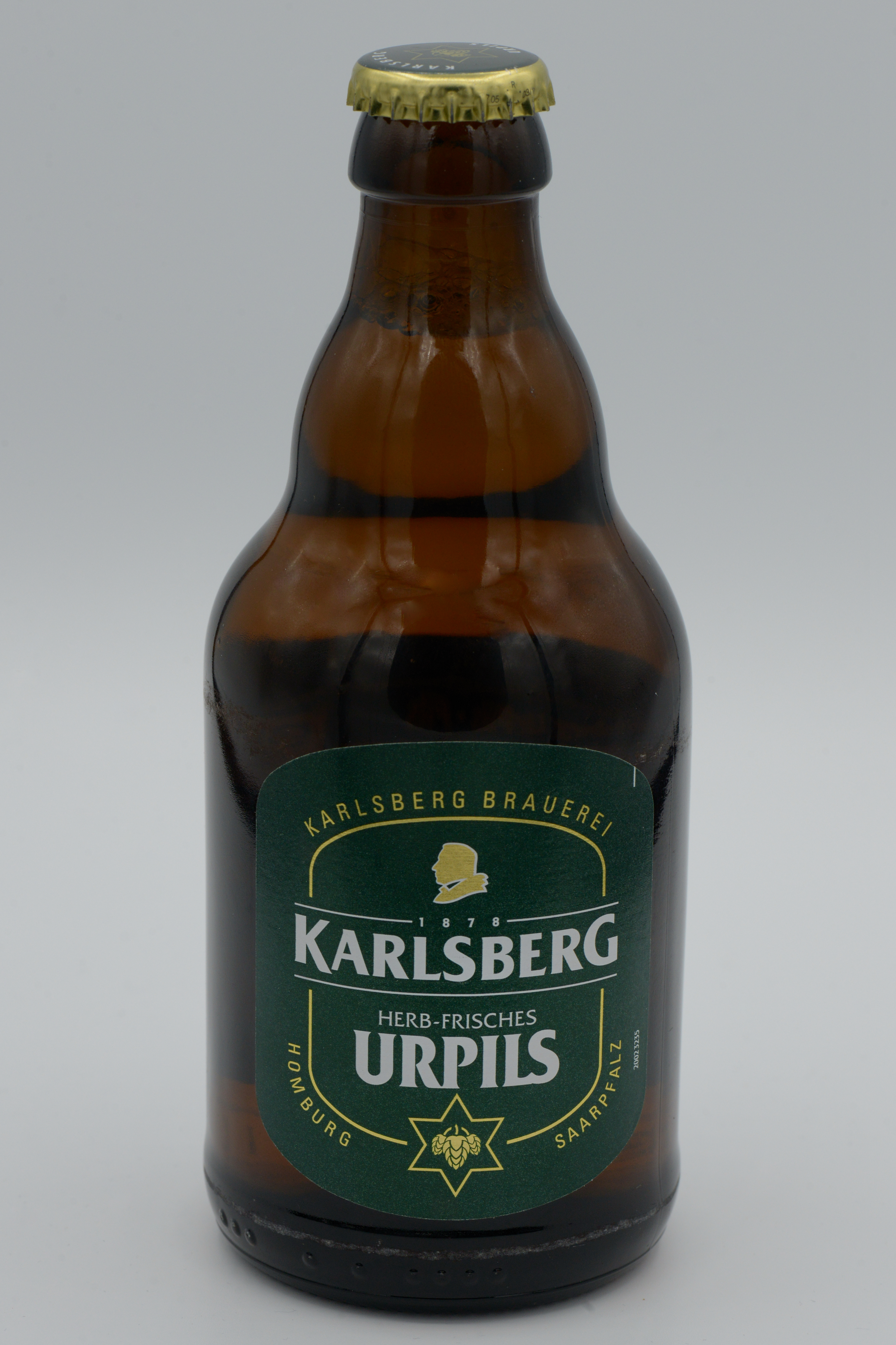 Urpils in der Stubbiflasche der Karlsberg Brauerei in Homburg, Saarland/ Deutschland (2018). Neues Etikett ab März 2018.